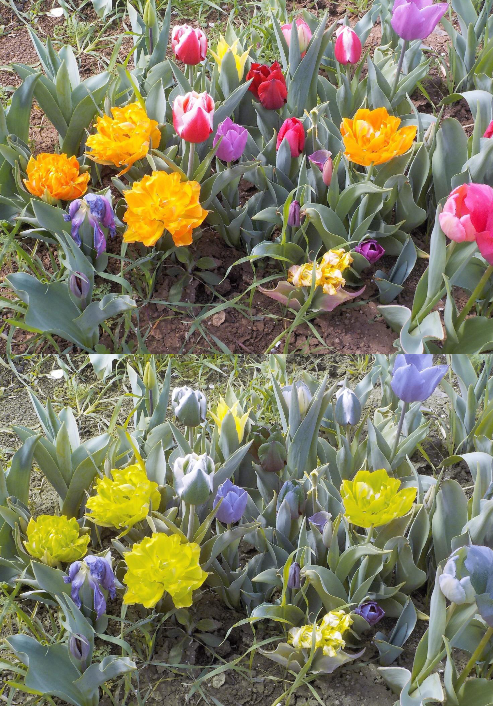 Confronto fra visione normale dei colori ed una forma di discromatopsiaː la protanopia o alterata visione del colore rosso